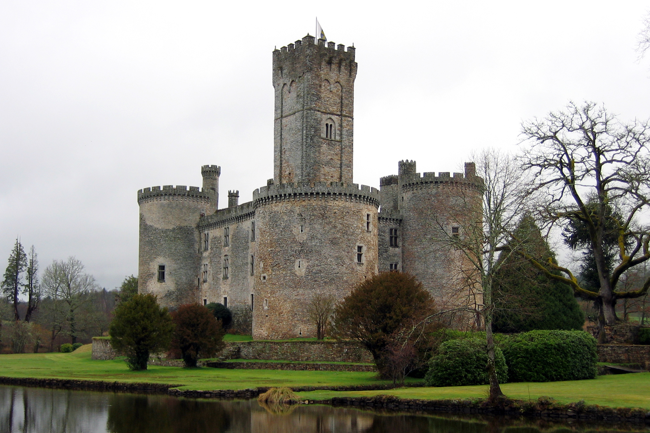 Château de Montbrun à Dournazac, Limousin. Arrosé par le Dournaujou, affluent de la Dronne.